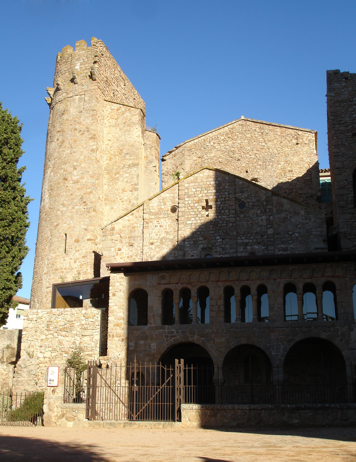 Monestir de Sant Feliu de Guíxols (Girona, Catalunya, Espanya)